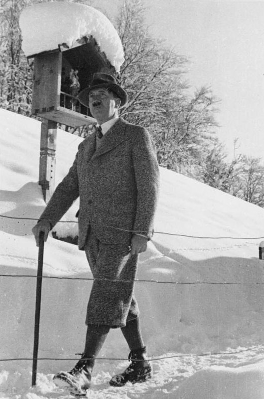 Urlaub in den Bayerischen Bergen: Bei einem Spaziergang